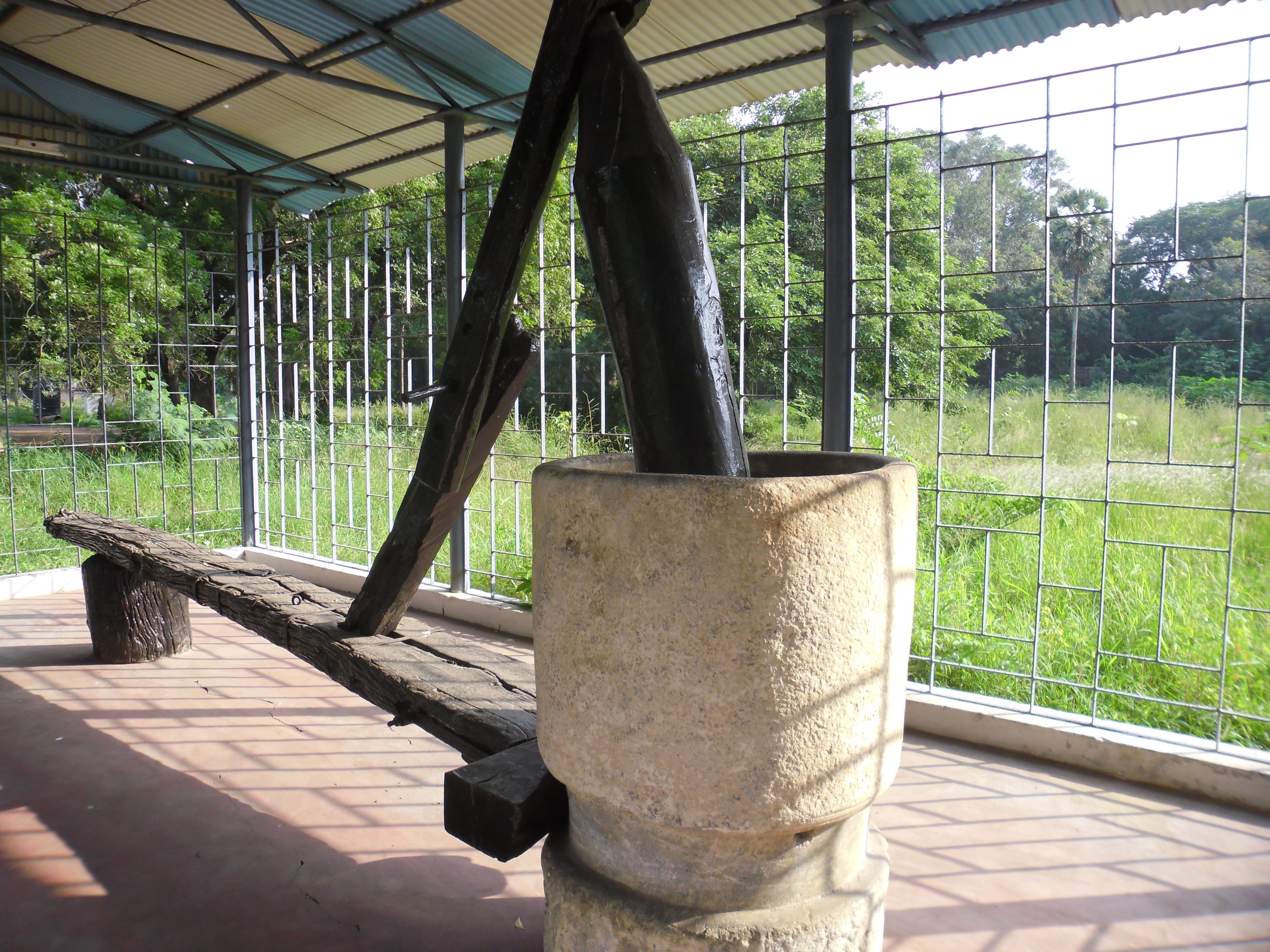 வ. உ. சிதம்பரனார் இழுத்த செக்கு